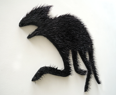 זאב מתוך הסדרה ציידים וניצודים